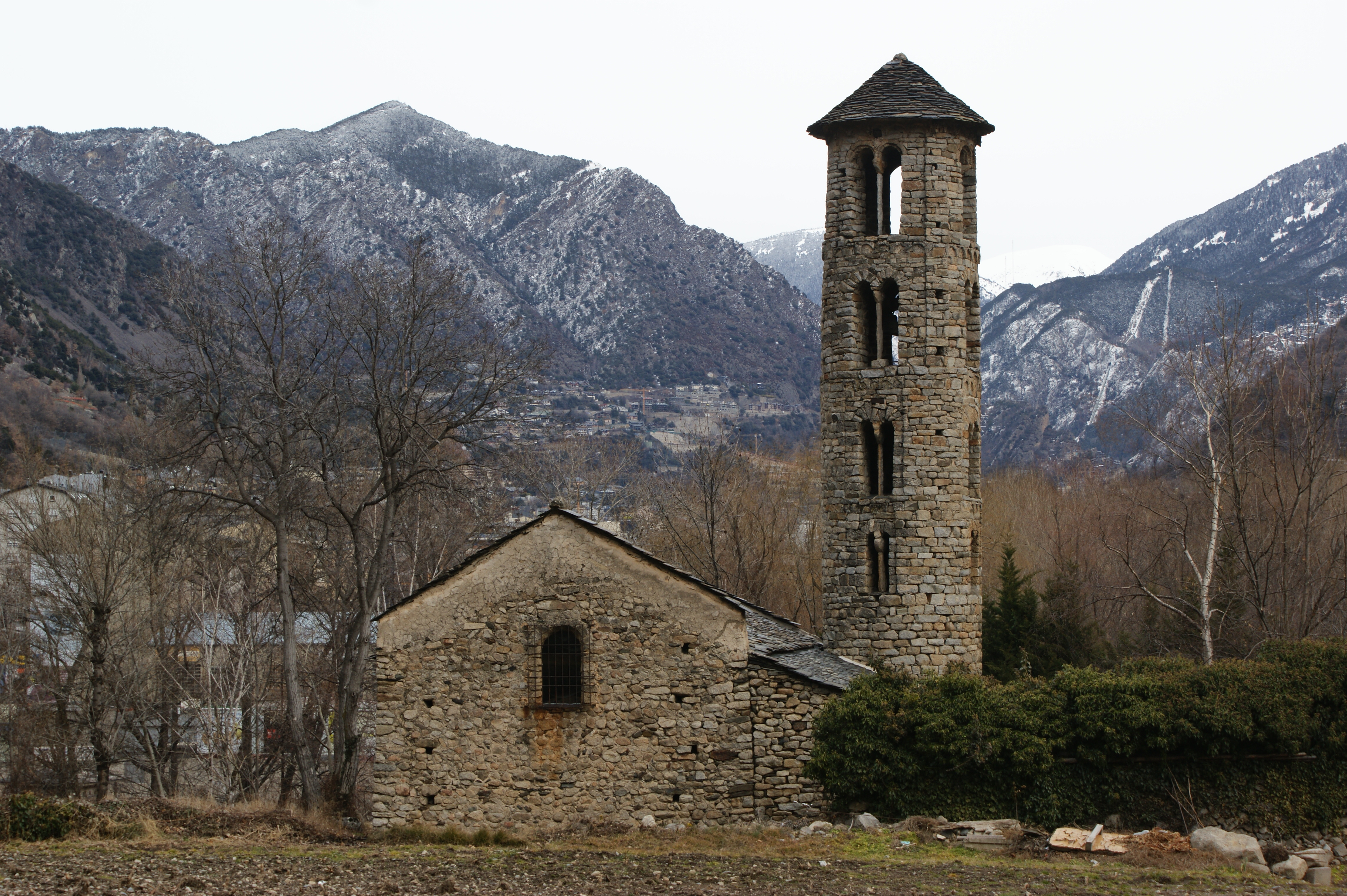 Església de Santa Coloma (Andorra la Vella)